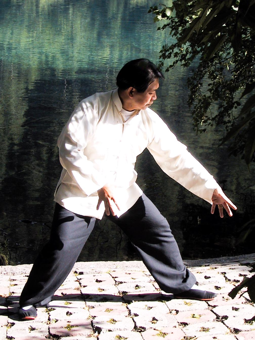 Meister Lam in Jiuzhaiguo, Sichuan